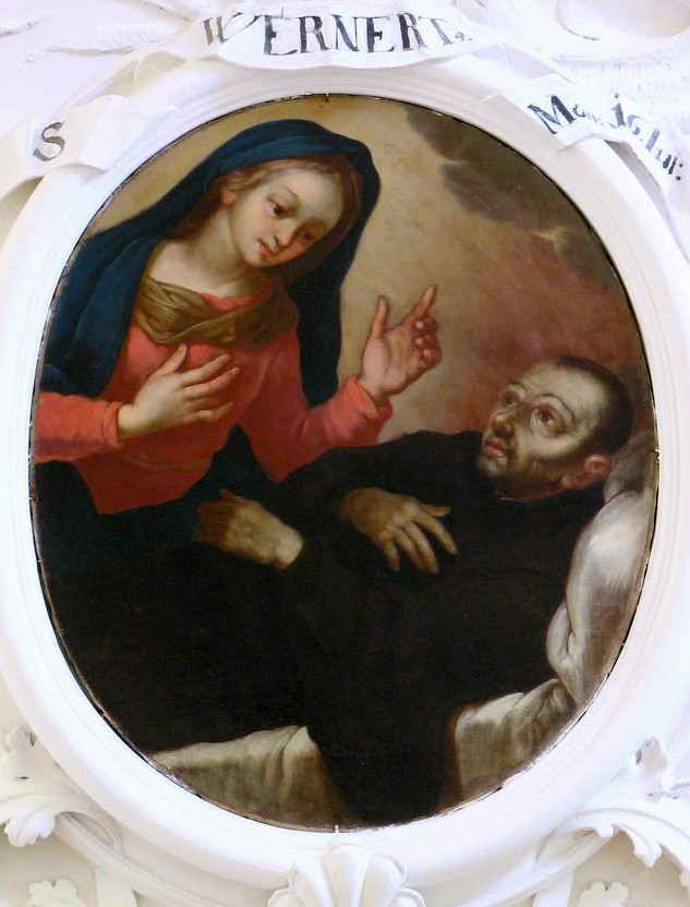 Bild eines Benediktiners namens Wernert